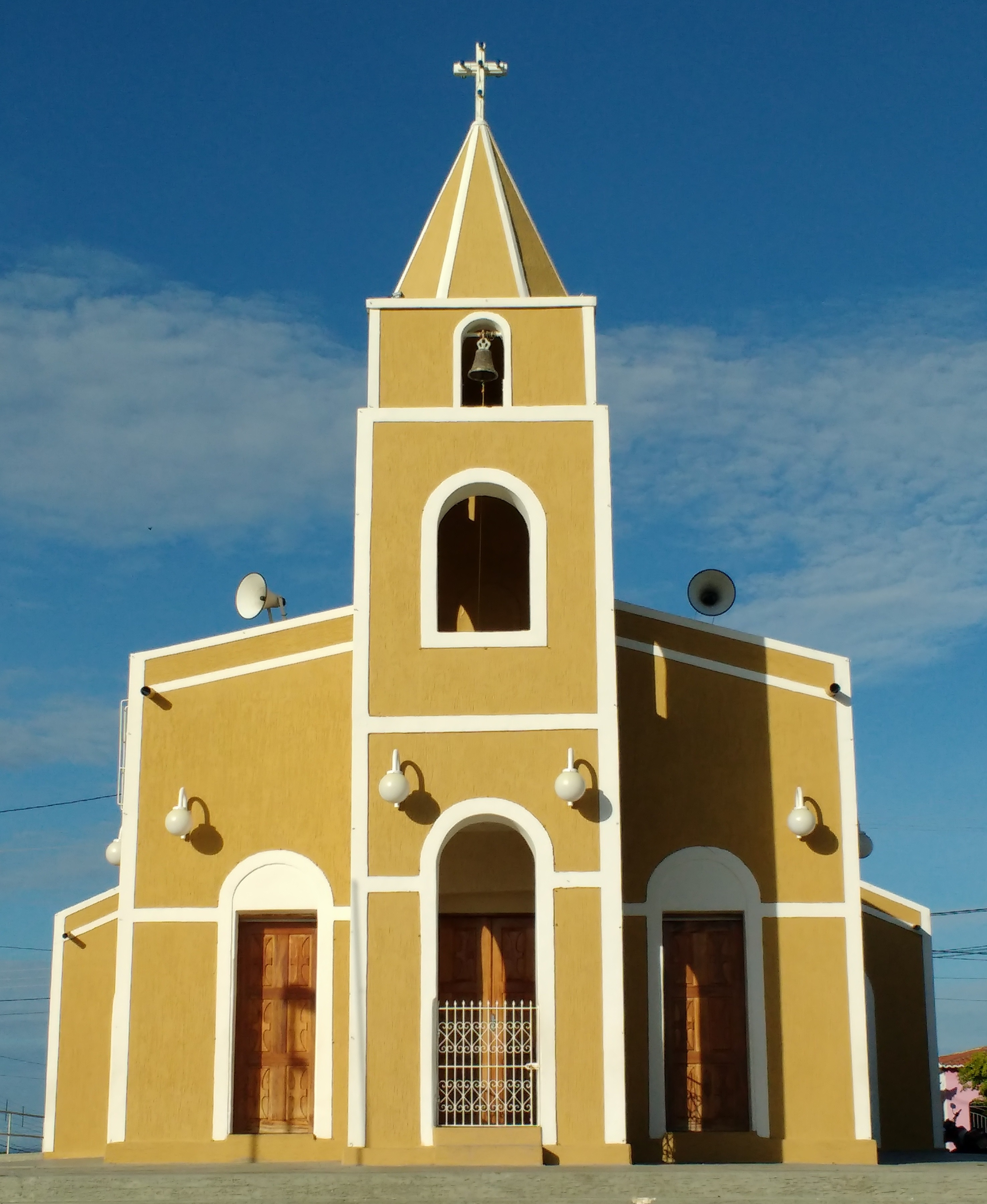 Capela de Santa Luzia, em Rafael Fernandes, Rio Grande do Norte (Brasil), que pertence à paróquia de Nossa Senhora da Conceição de Pau dos Ferros.